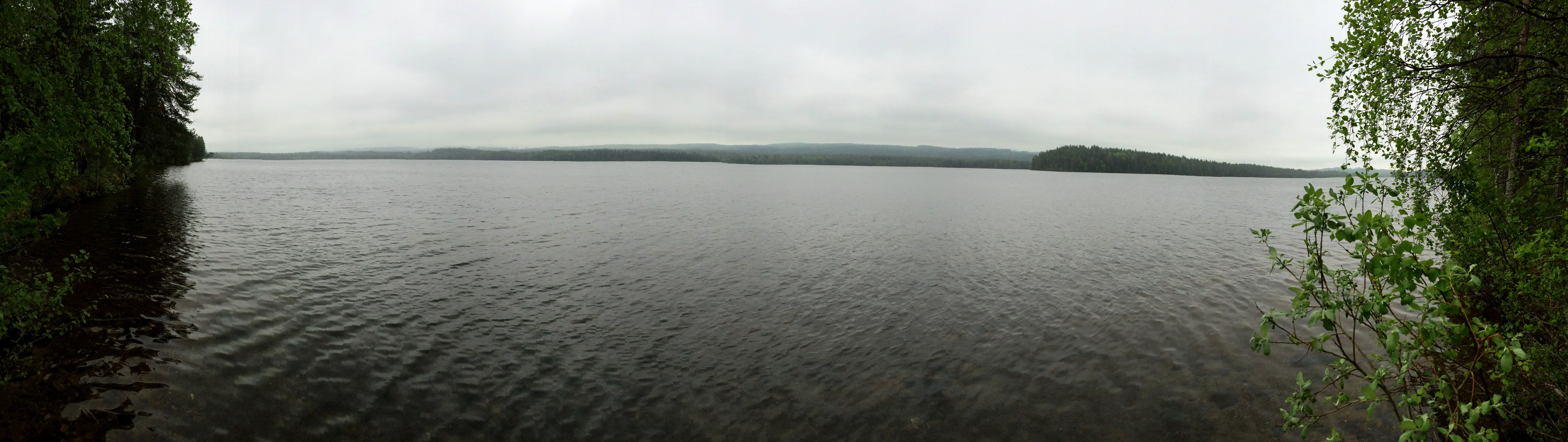 Сюяярви